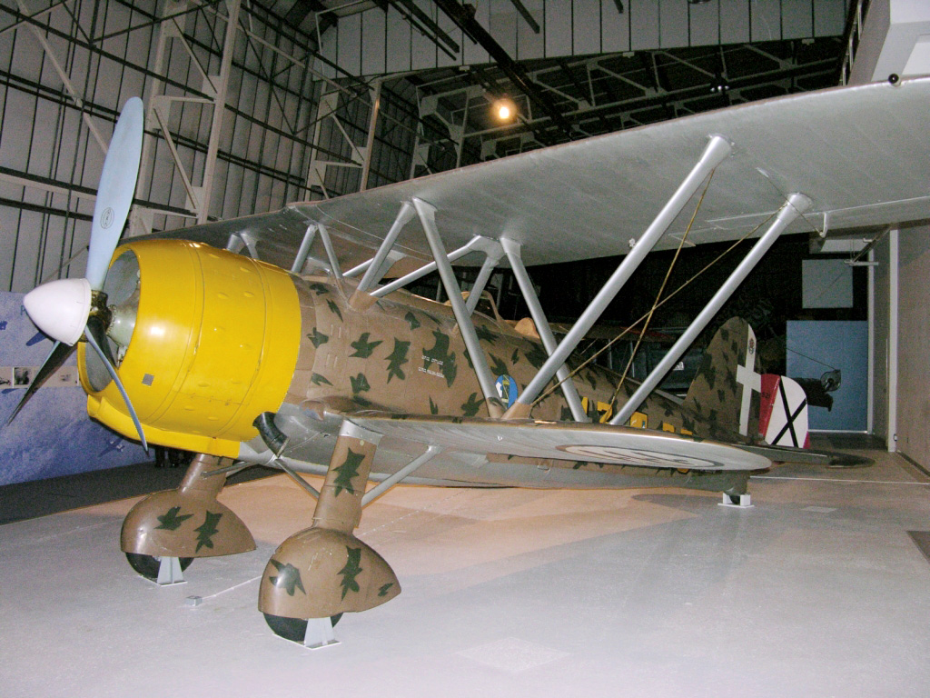 Fiat CR42 Falco - Caccia monoposto della Regia Aeronautica - Seconda Guerra Mondiale - Royal Air Force Museum - Hendon - London